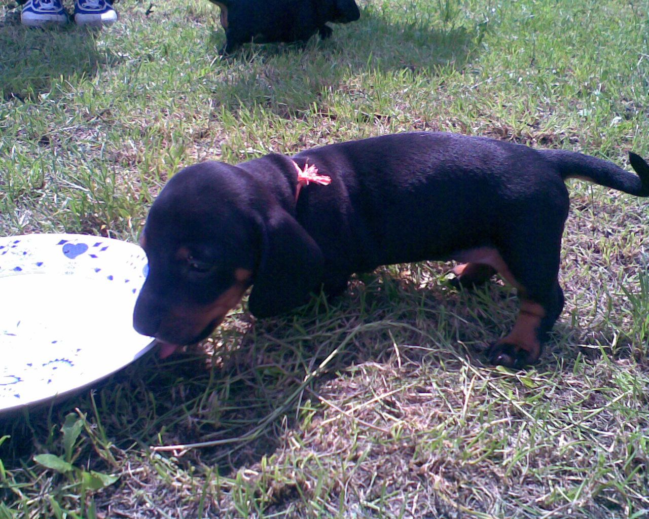 Dachshund